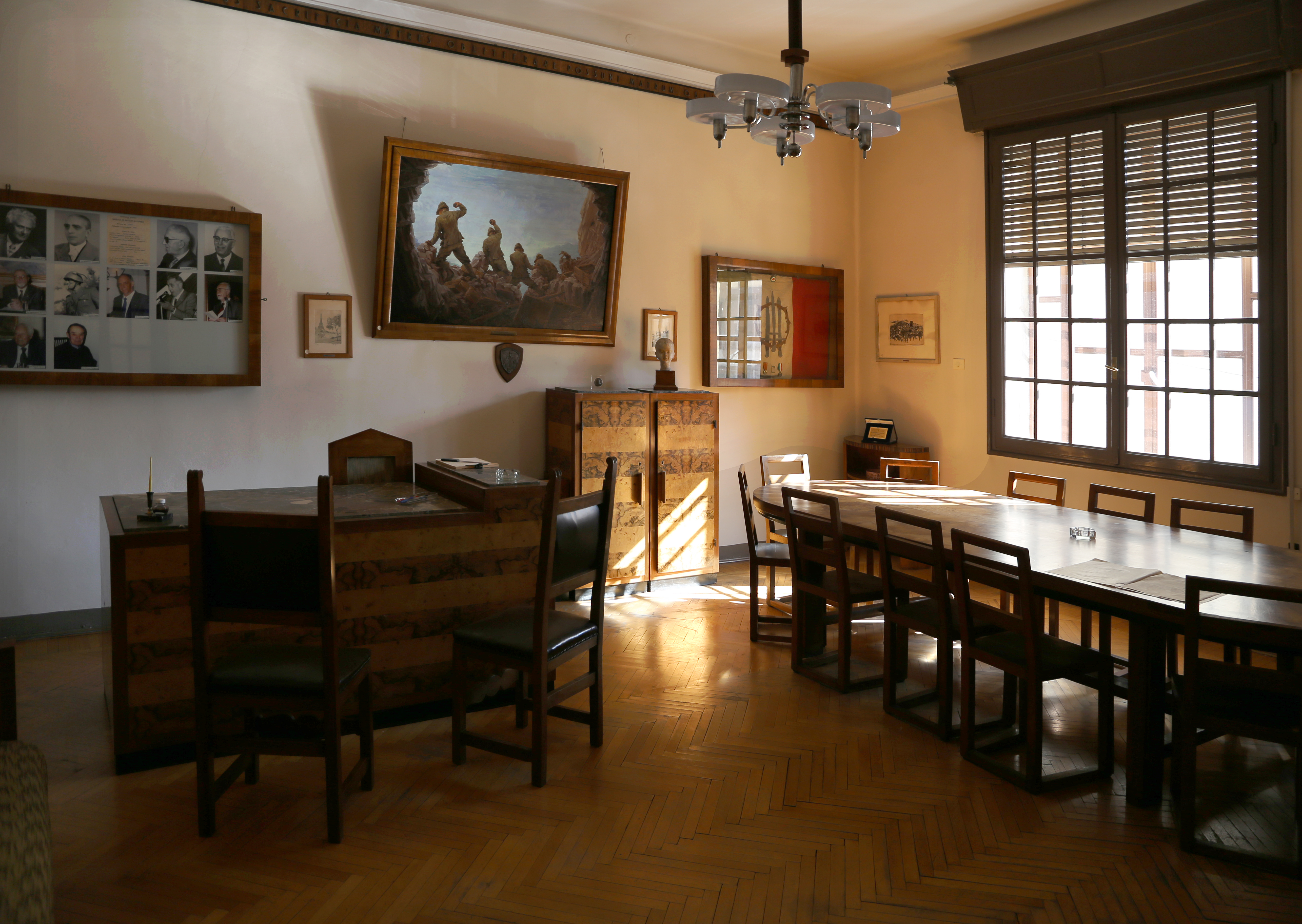 Casa del Mutilato This is a photo of a monument which is part of cultural heritage of Italy.